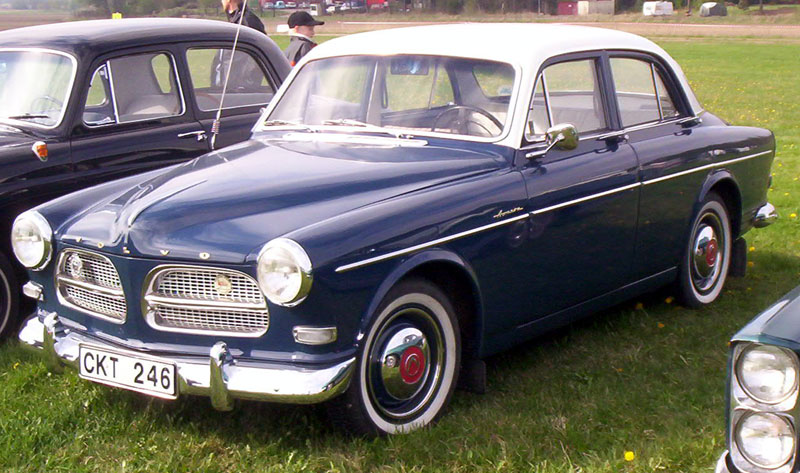 Volvo 121 4-Door Sedan 1959